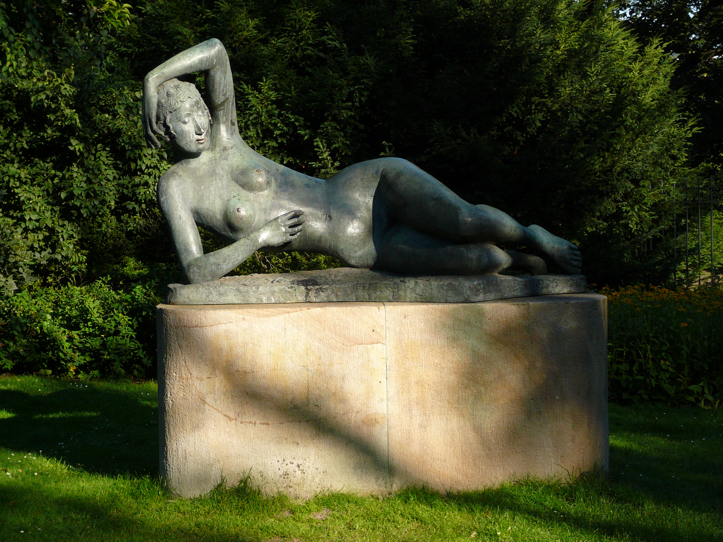 Eine Statue von Gerhard Marcks in den Bremer Wallanlagen (1968). Die Figur ist nach der griechischen Insel Ägina benannt, auf der Marcks ein Ferienhaus besaß Das abgebildete Objekt ist ein geschütztes Kulturdenkmal in der Freien Hansestadt Bremen, mit der Nr. 1193,T009 beim Landesamt für Denkmalpflege registriert.